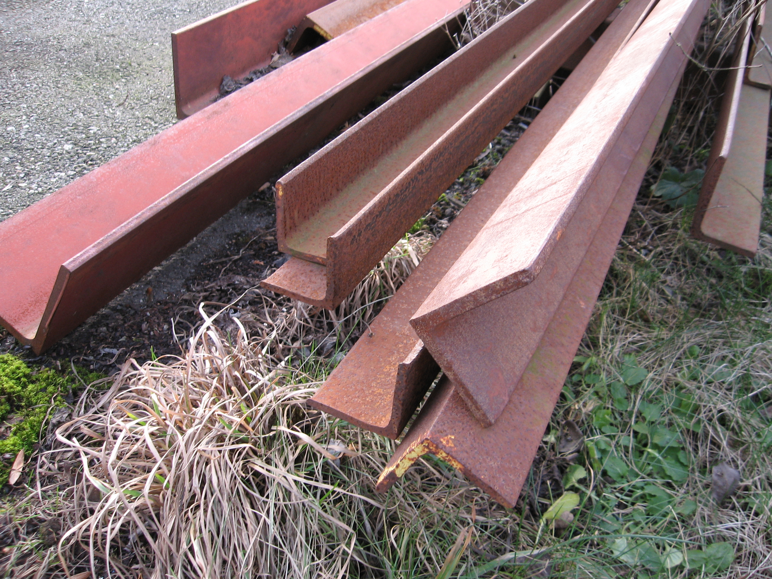 L-järn i S235JR kvalitet, vilket syns på den gula färgmärkningen.